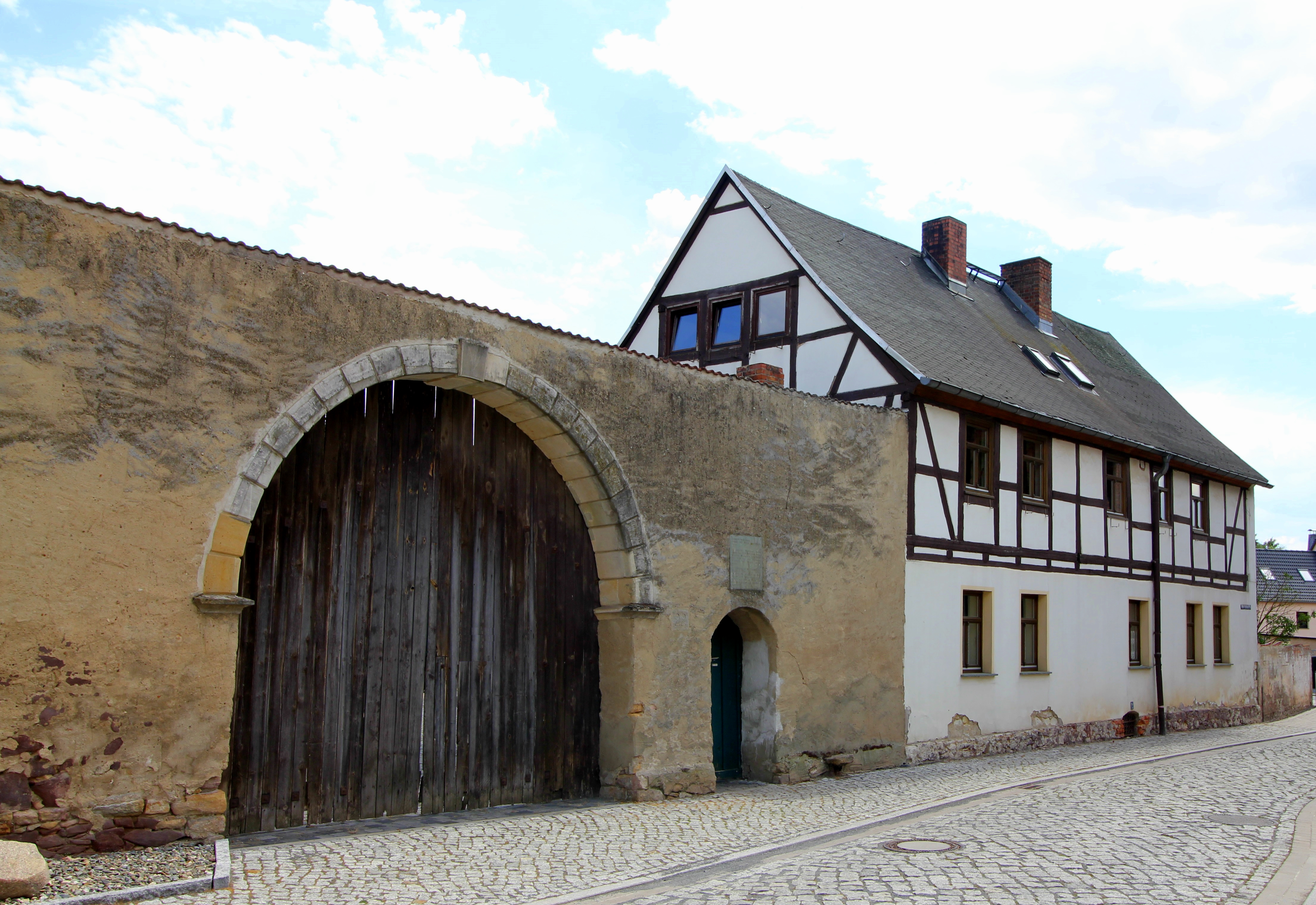 Bauernhof Walter-Rathenau-Straße 22 in Niederndodeleben